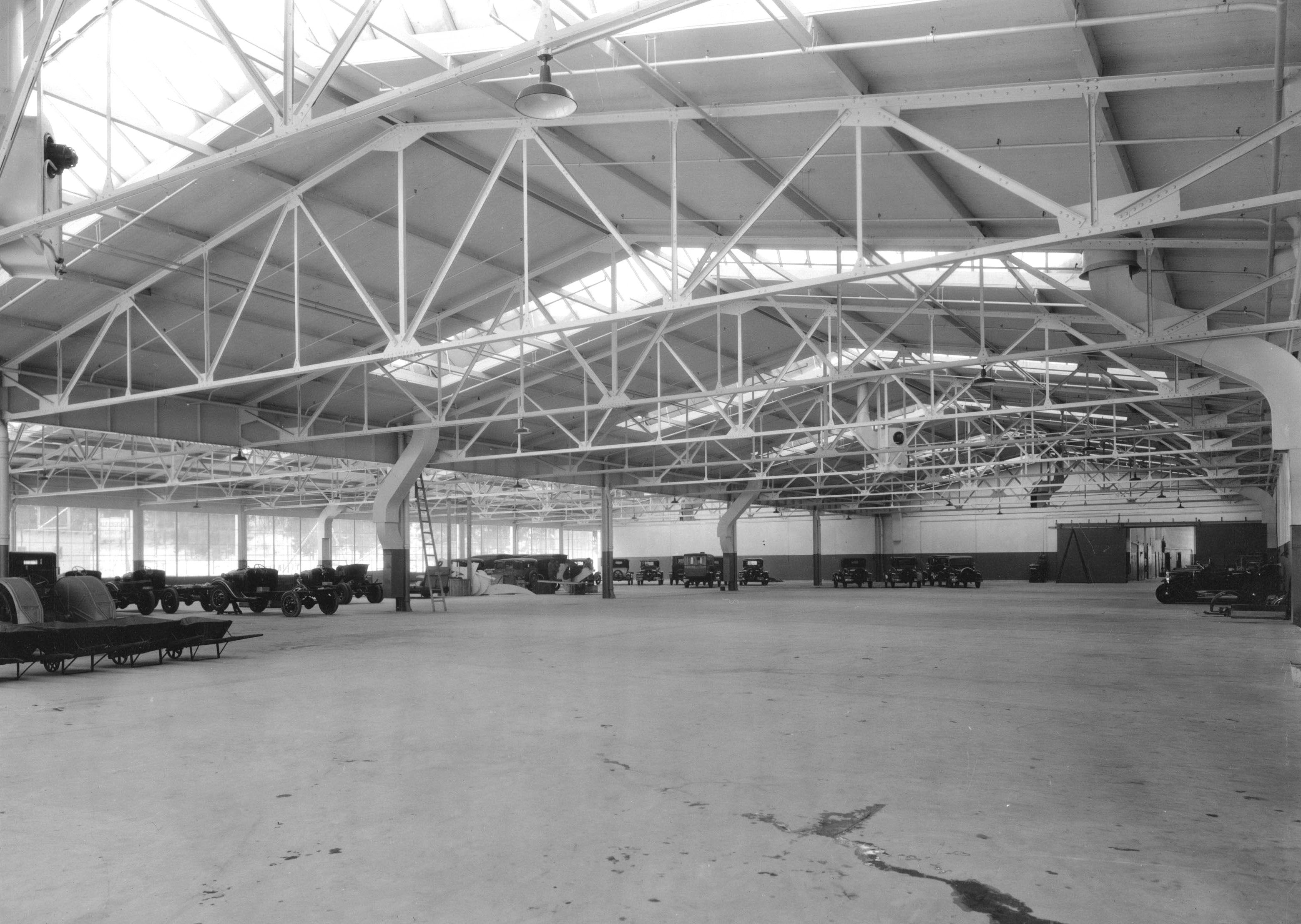 Stockholms Frihamn: Ford Motor Company´s komplex i Frihamnen. Lagerhall för automobiler.